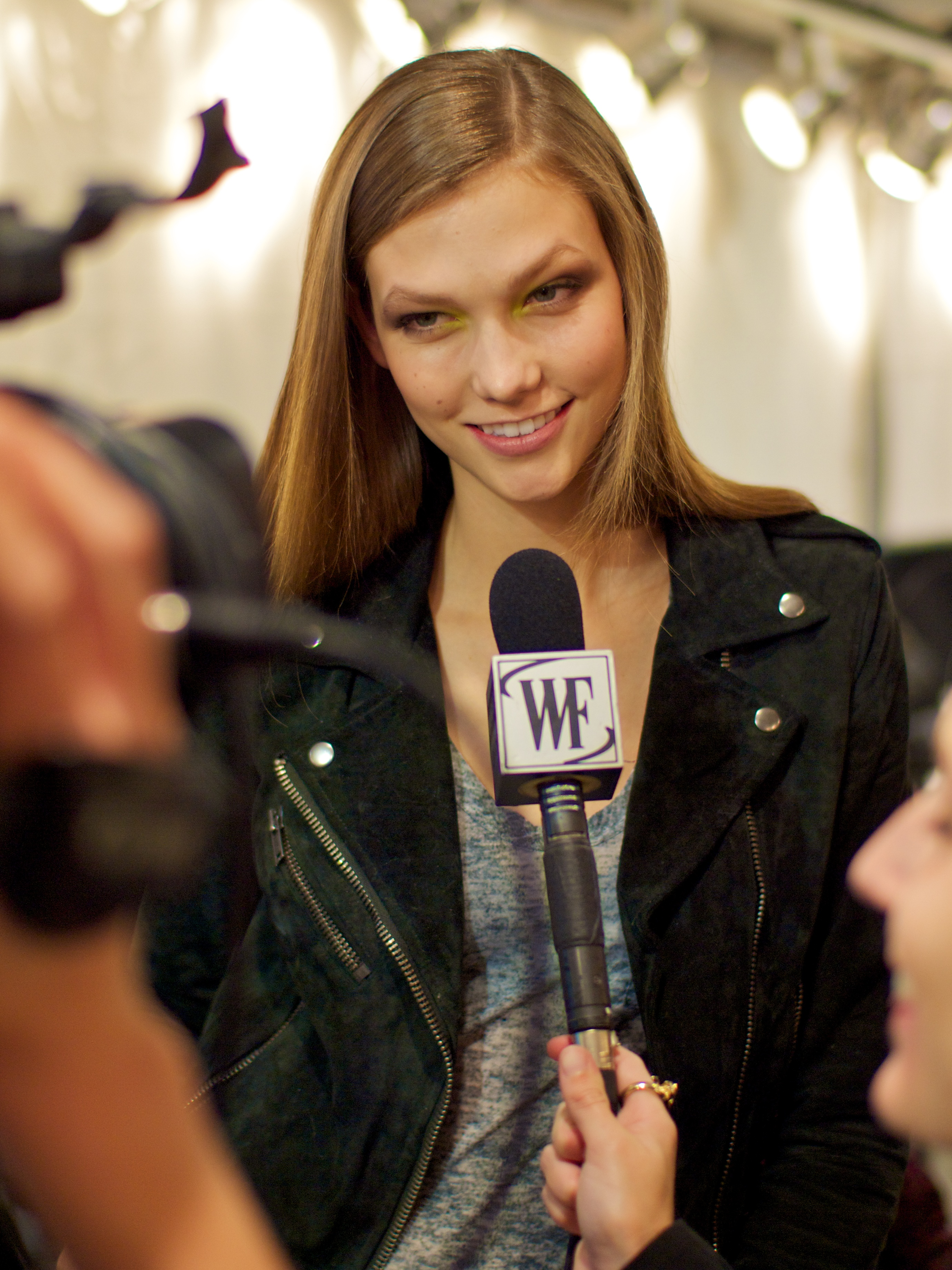 Elie Saab backstage pap p-é 2011